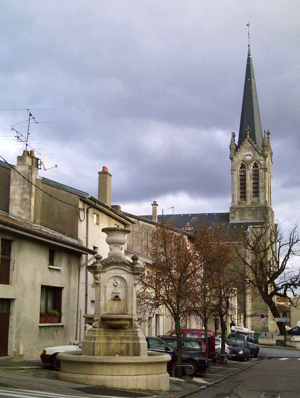 L'église Saint-Genès, et la fontaine de la place de la Liberté à Laxou (54), vue depuis l'angle rue du pressoir-rue Jules Ferry.